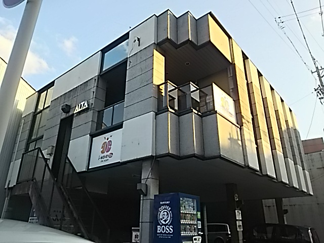 エフエムいちのみや本社・演奏所